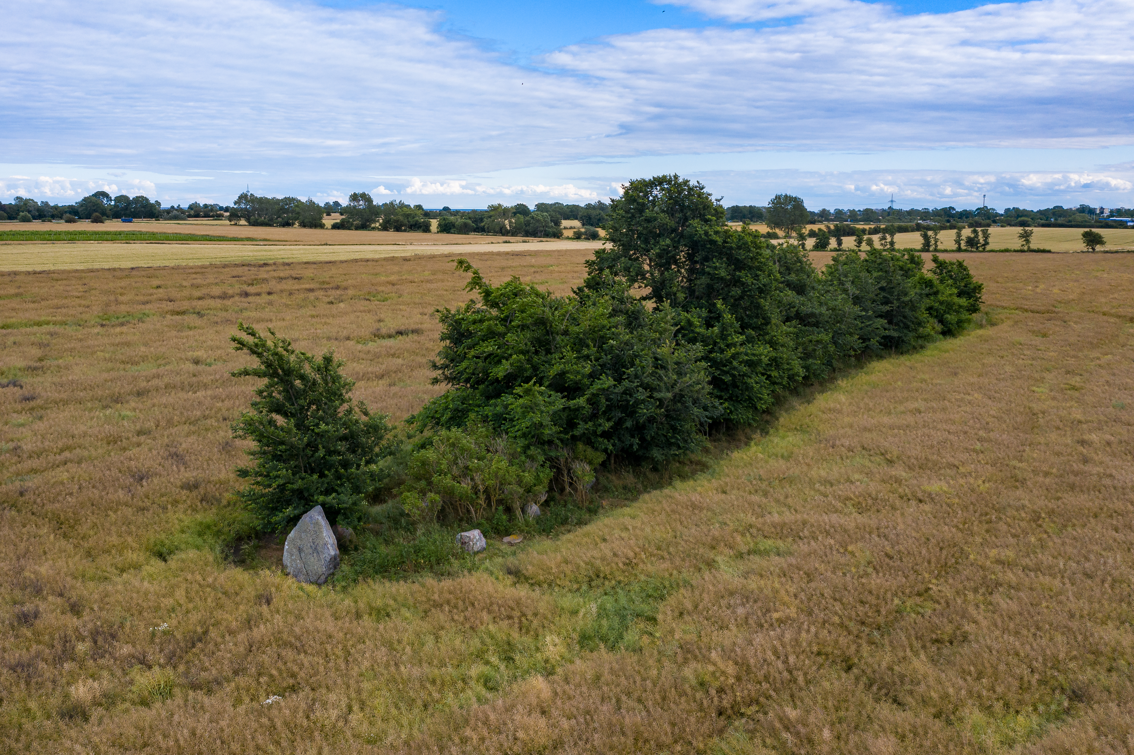 Langbett Krausort, in einem Rapsfeld gelegen und weitgehend zugewachsen. Nördlicher Teil, Blick von Nordwesten. Die Anlage lag zum Zeitpunkt der Aufnahme in einem Rapsfeld und war zu Fuß nicht erreichbar, daher erfolgte die Aufnahme mit einer Kameradrohne.